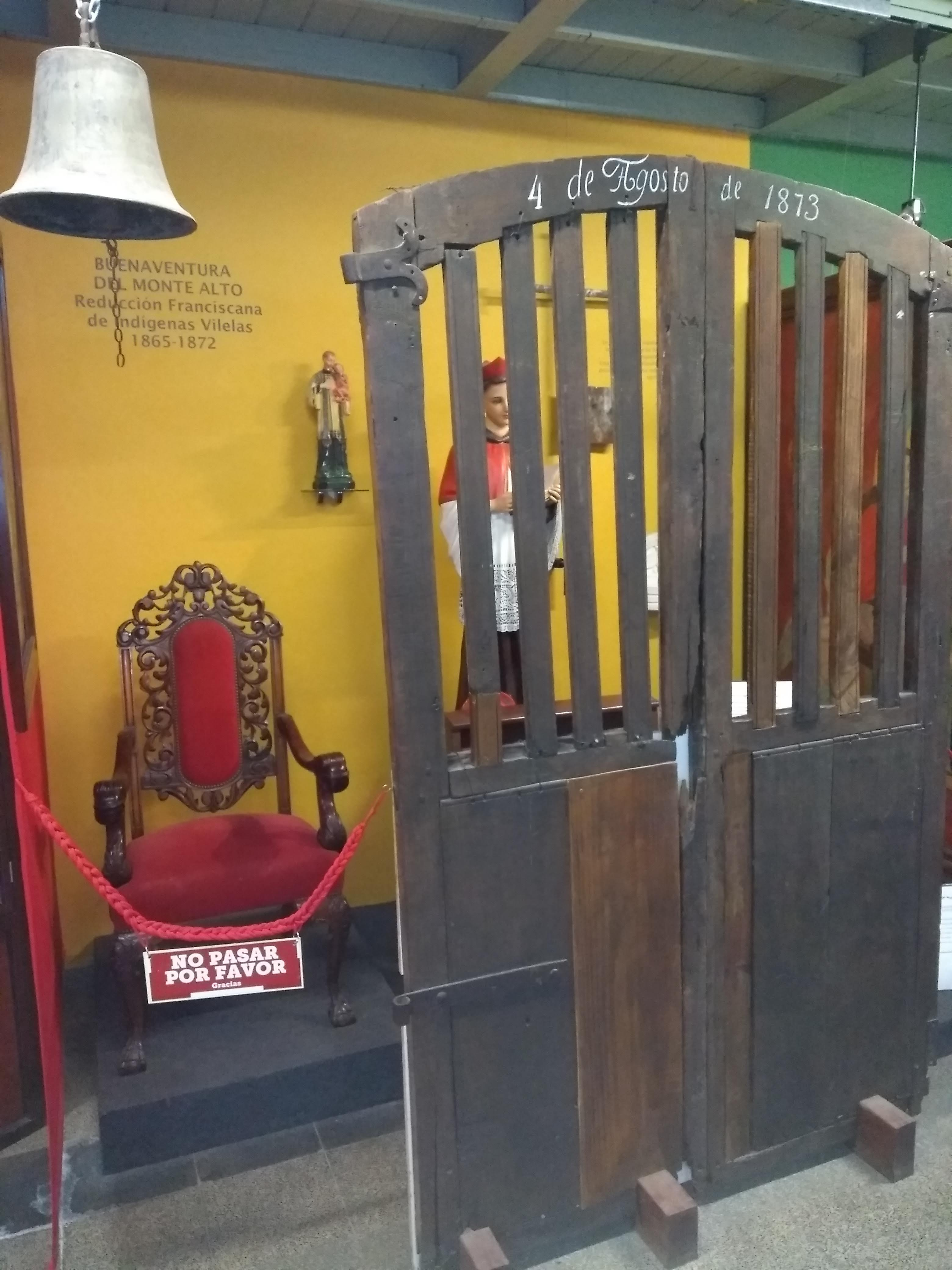 Puerta, santo, silla, campana y otros objetos en exhibición permanente en el Museo del Hombre Chaqueño, pertenecientes al templo católico alrededor del cual funcionó la reducción de San Buenaventura del Monte Alto (Resistencia, Argentina) entre 1865 y 1872.